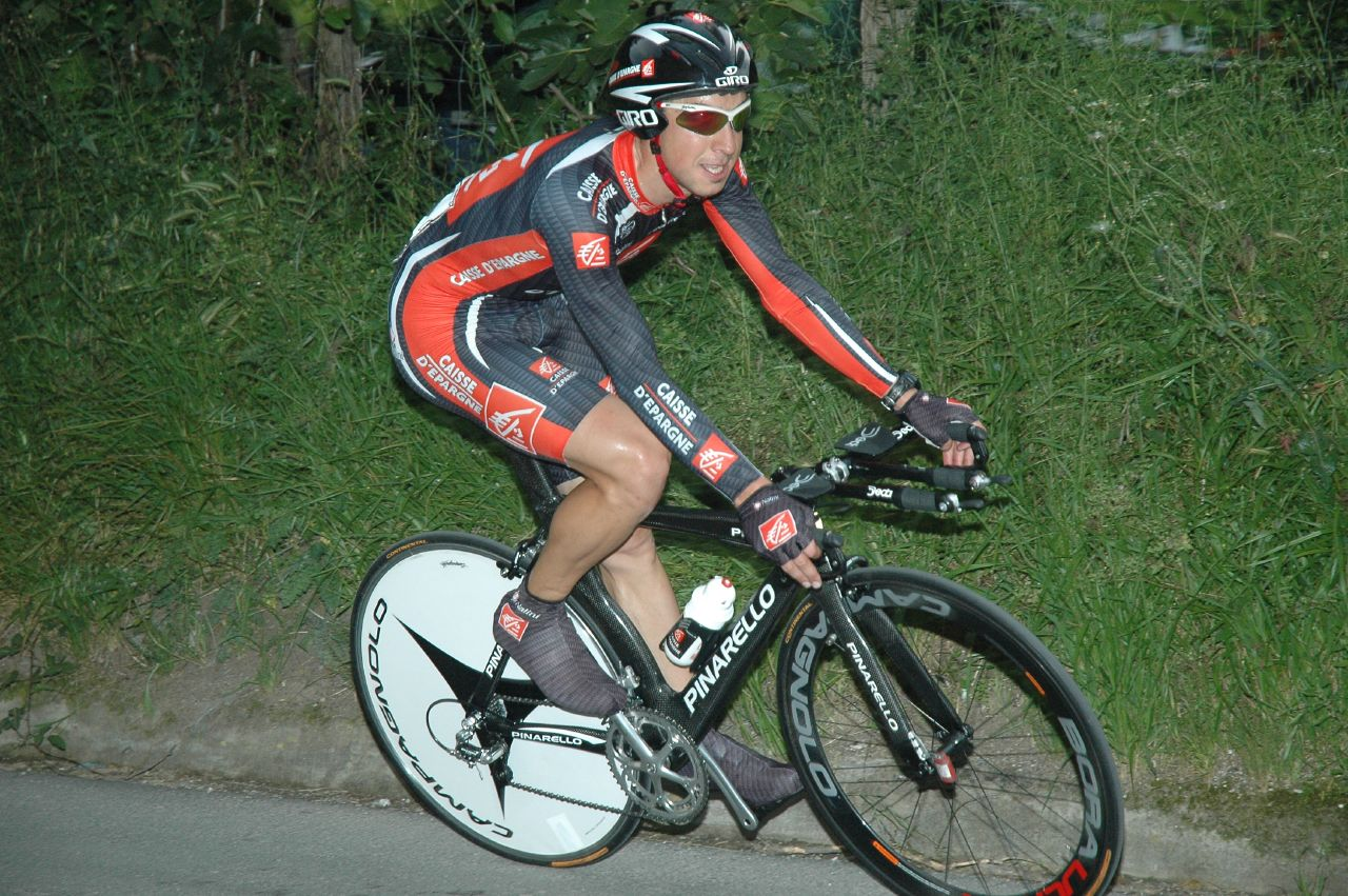 Aitor Pérez Arrieta, Euskal Bizikleta 2007